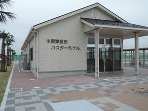 新バスターミナル待合室